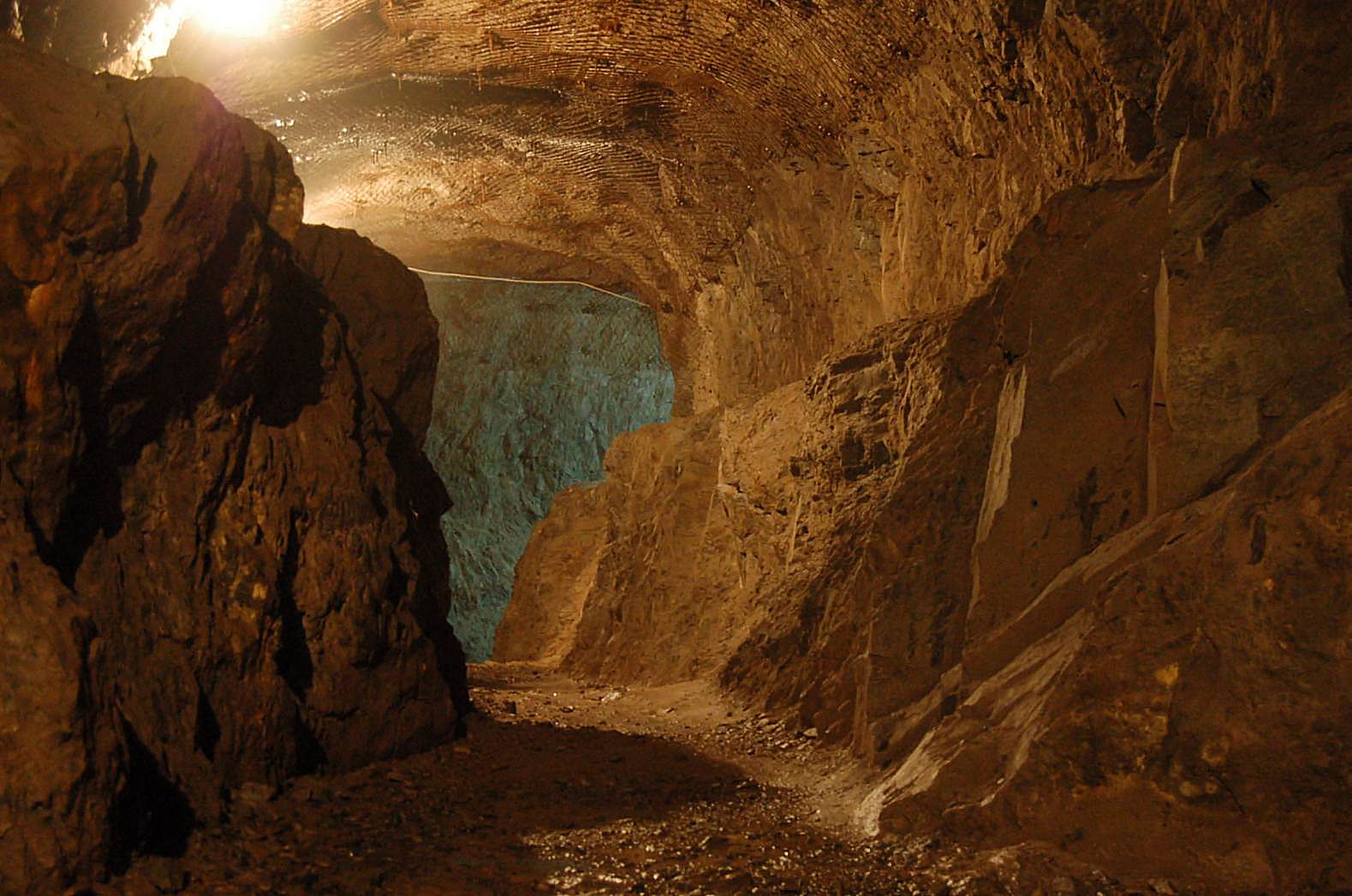 Miasto podziemne w Osówce